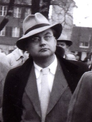 The German architect Ludwig Schweizer